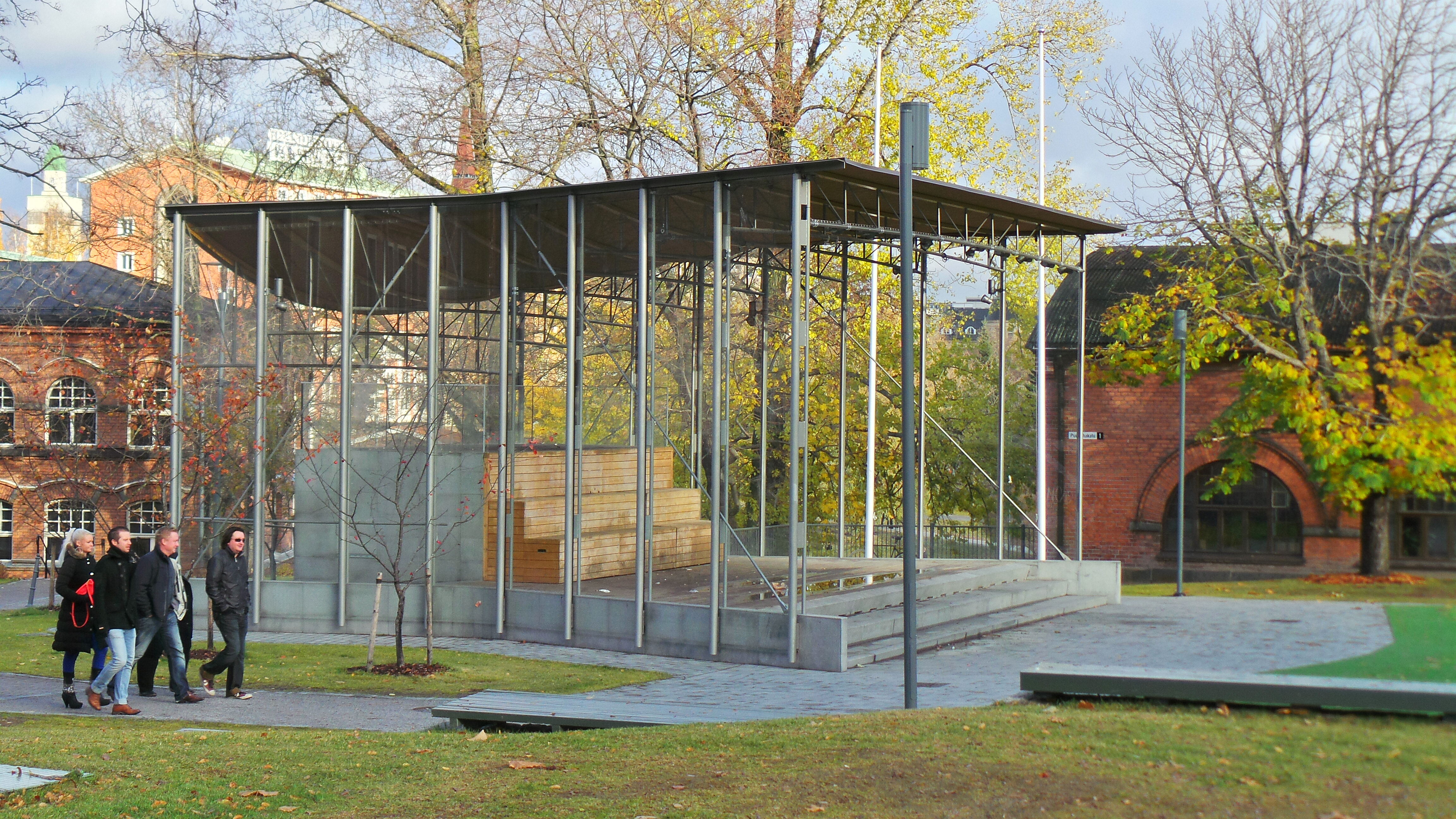 Vanhan kirjastotalon puisto, Laikunlava